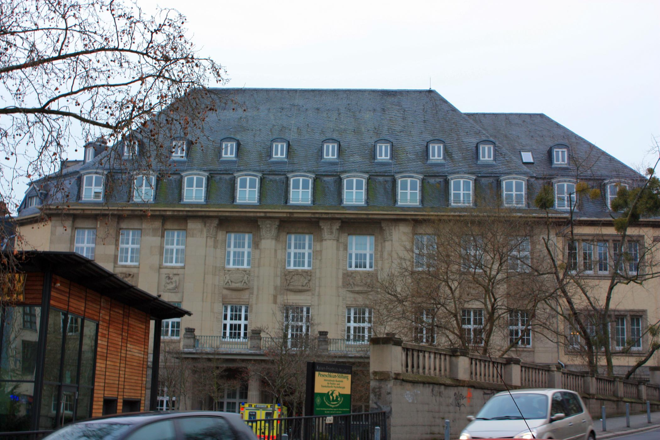 Die Kaiser-Friedrich-Therme in Wiesbaden, erbaut 1910/13